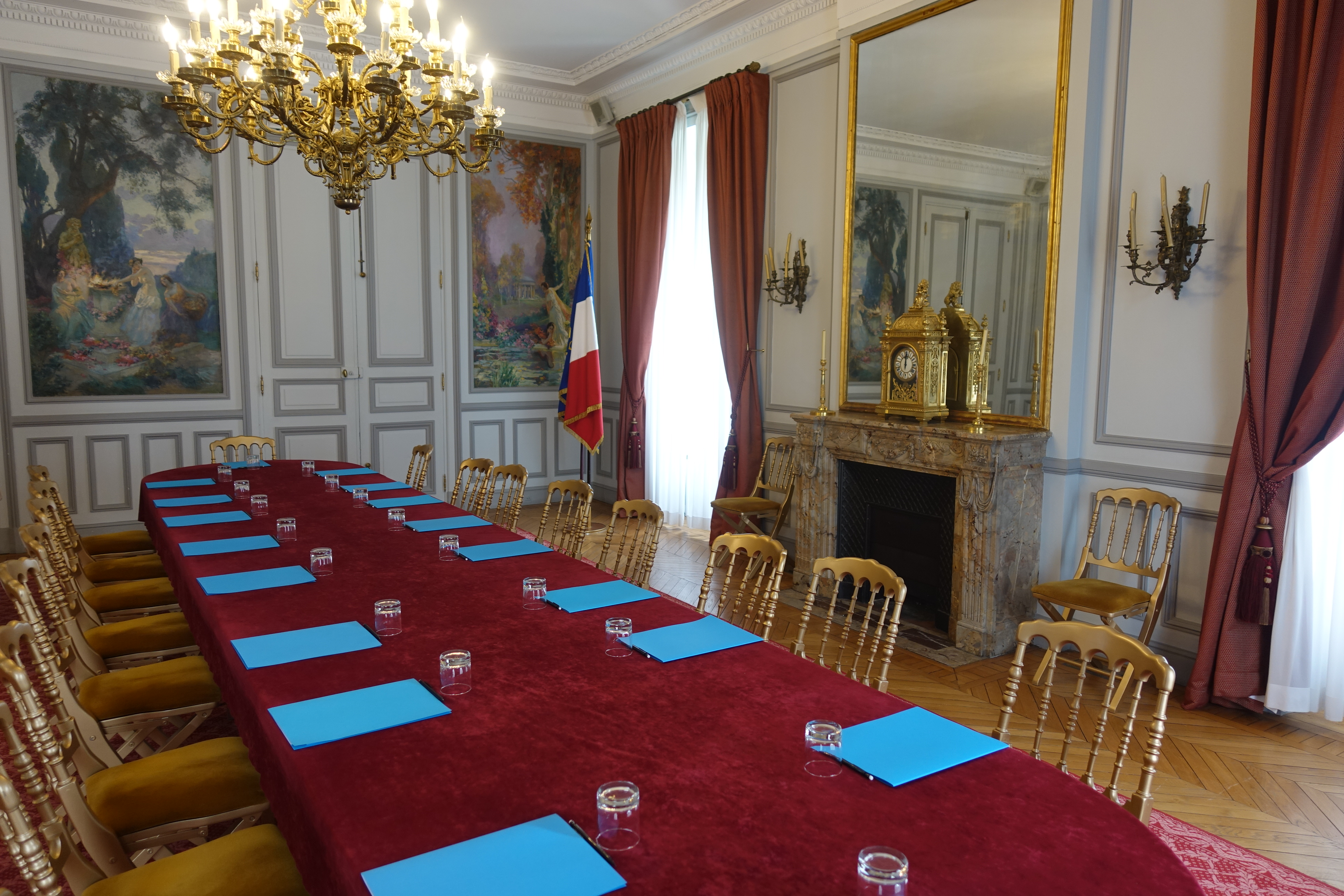 Prise de vue de la salle et table de réunion où se réunissent les conseilles ministériels des Outre-Mer chaque semaine. Photo prise lors des journées européennes du patrimoine 2019